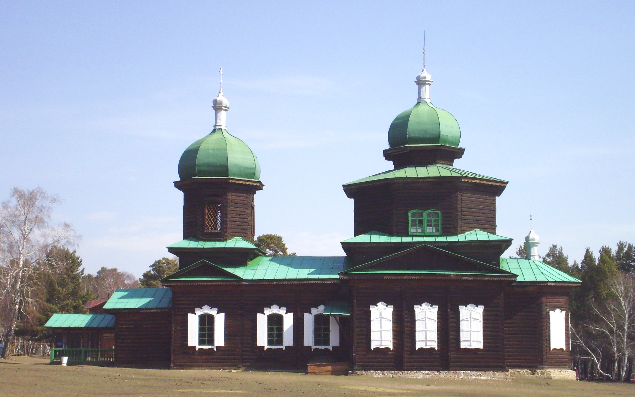 Старообрядческая Никольская церковь. Начало XX века. Мухоршибирский район, Бурятия( г.Улан-Удэ Этнографический музей народов Забайкалья)